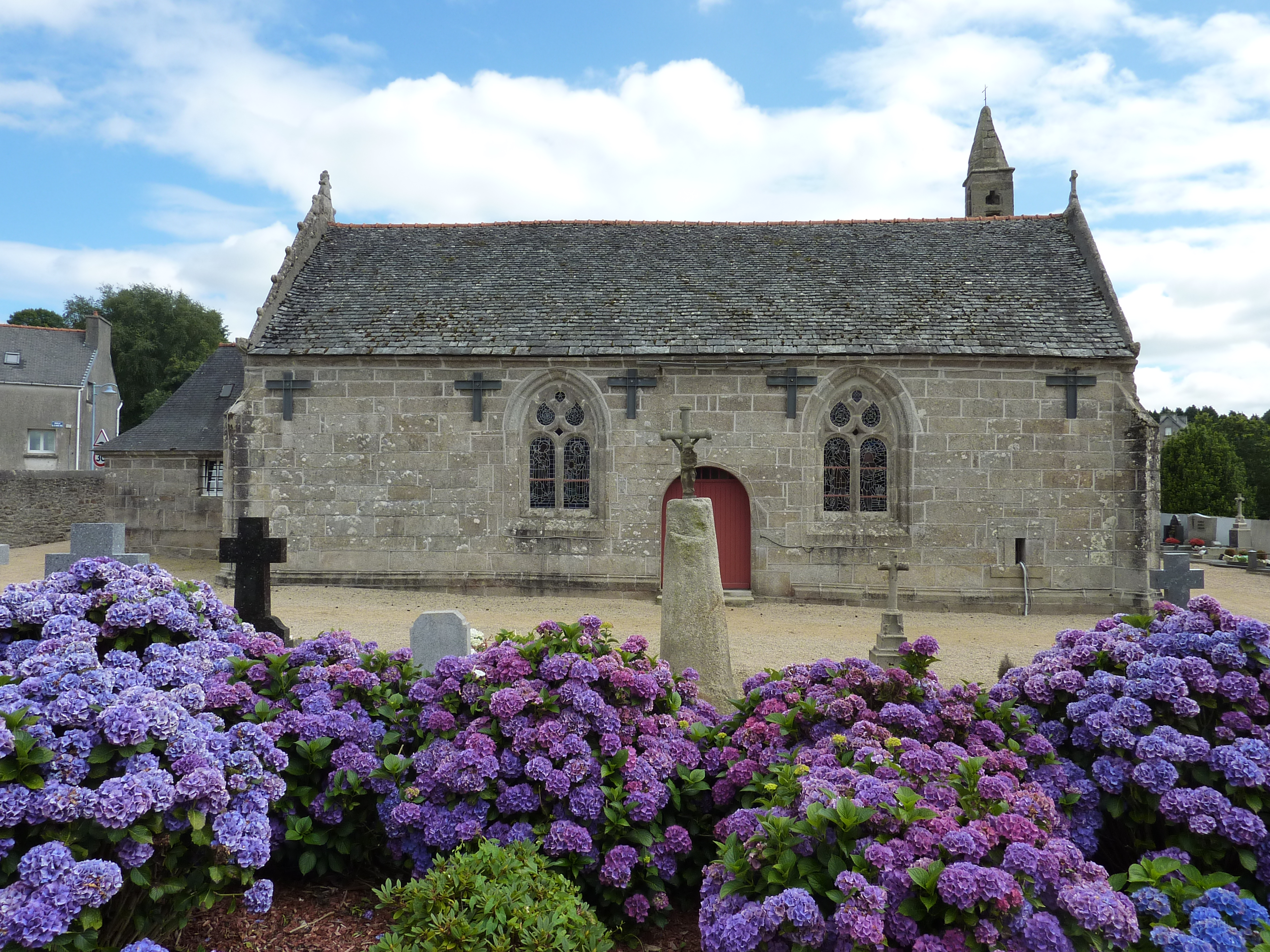 Loc-Eguiner-Saint-Thégonnec: l'église et la borne miliaire